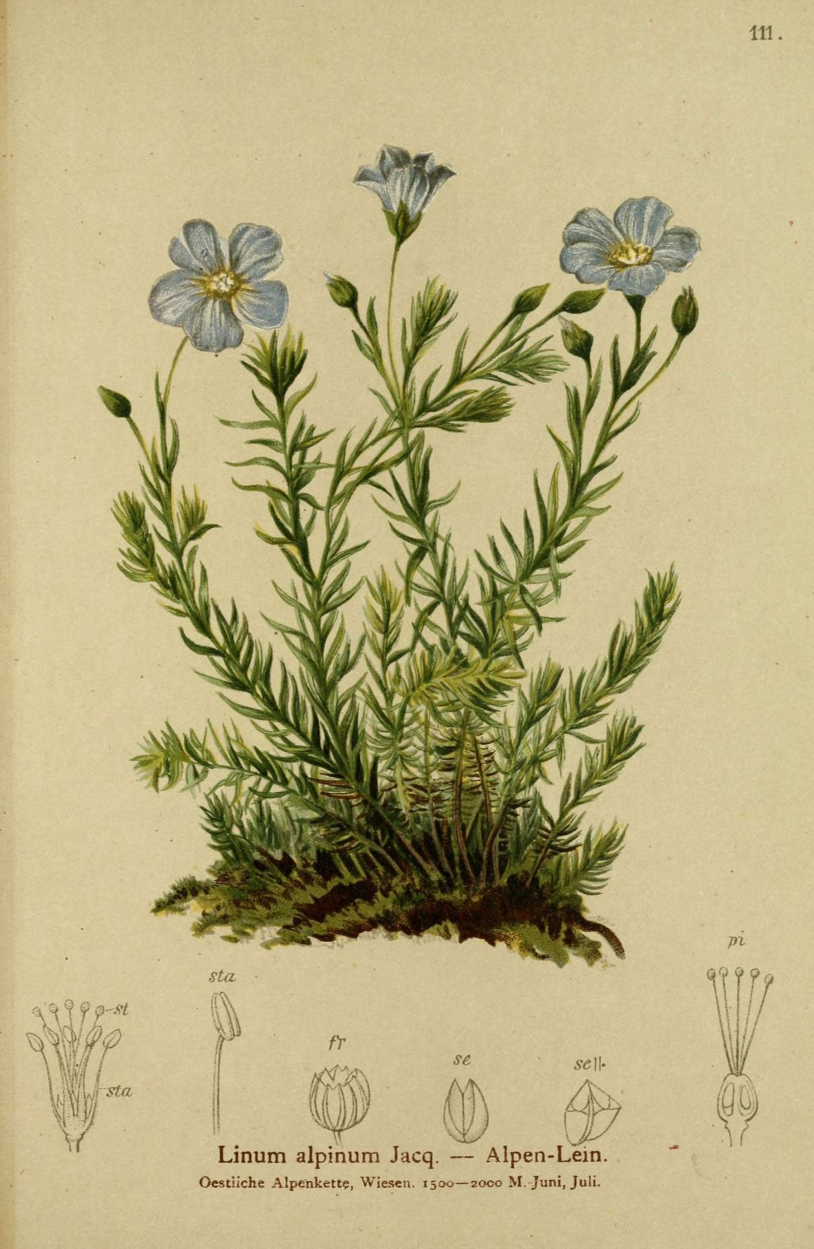 111 ?1 ,Q Ol Linum alpinum Jacq. — Alpen-Lein. Oestiiche Alpenkette, Wiesen. 1500 — 2000 M.Juni, Juli.